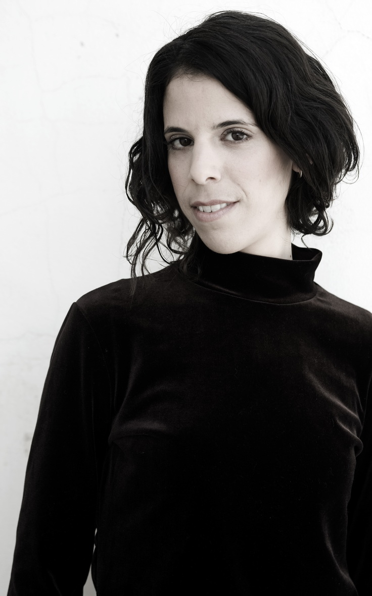 ענבל לורי